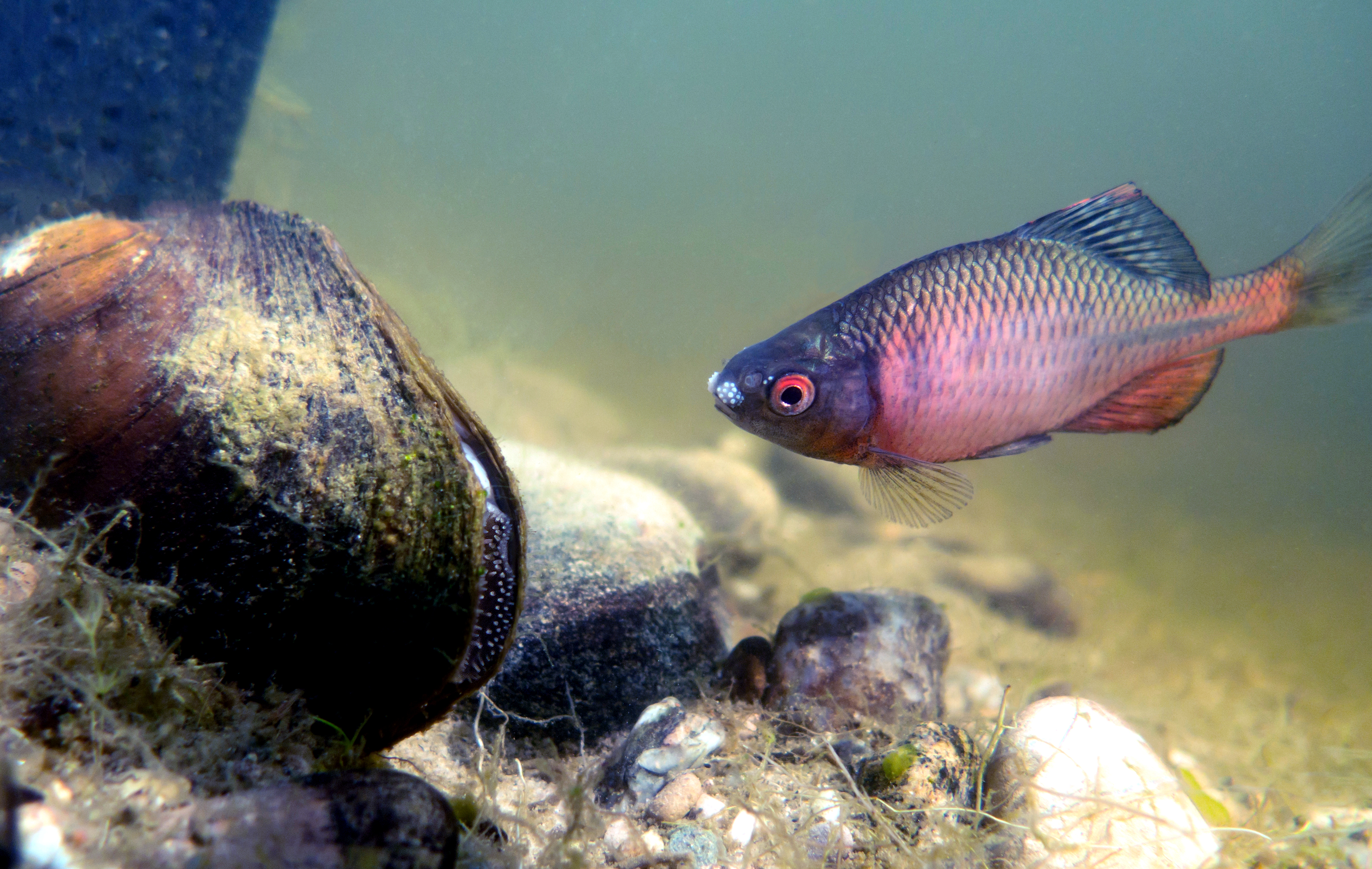 Männlicher Europäischer Bitterling zur Laichzeit bei der von ihm beanspruchten Muschel